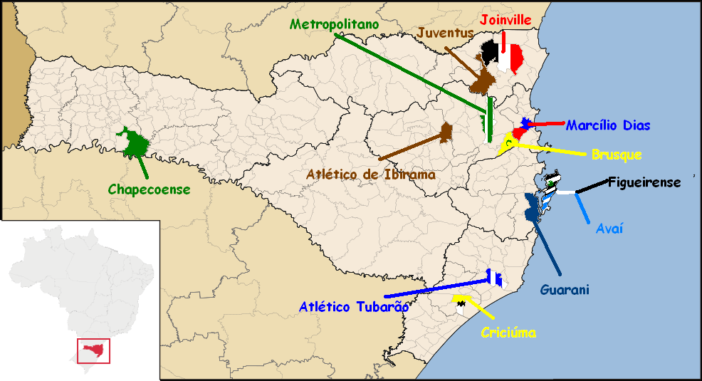 Campeonato Catarinense 2008 map